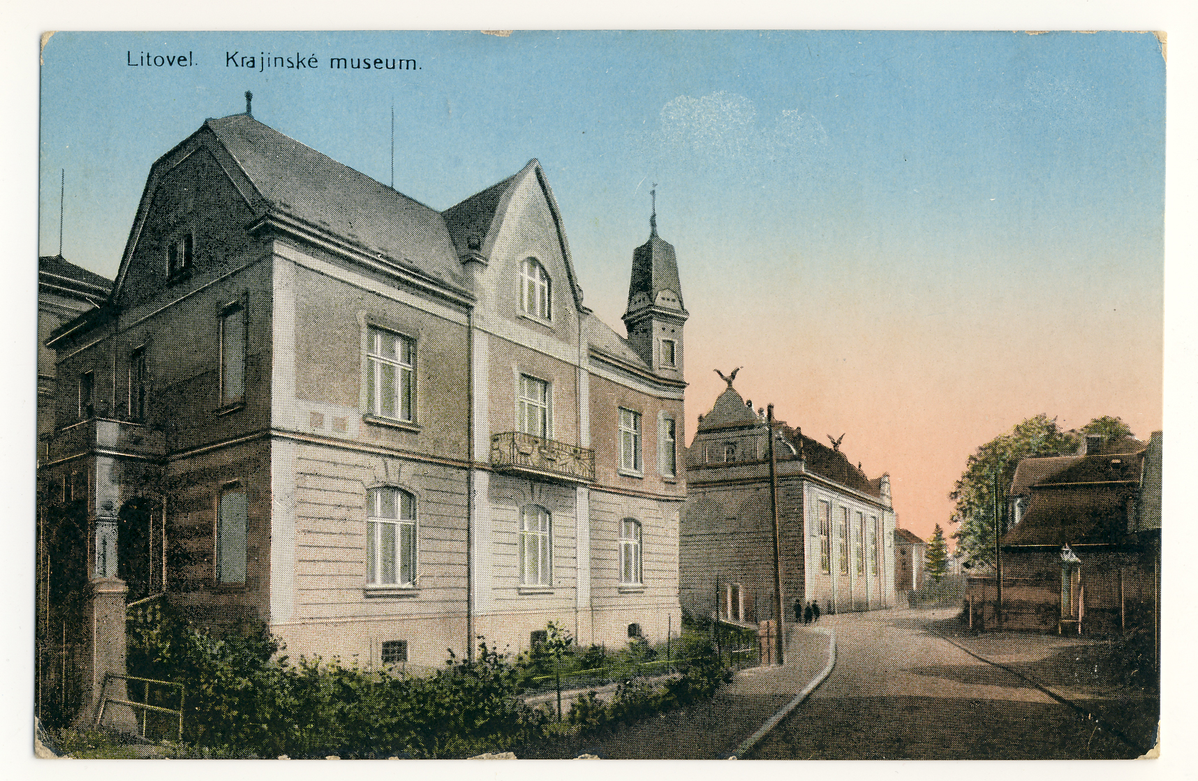 Litovel, Vila Vácslava Sochy a stará sokolovna